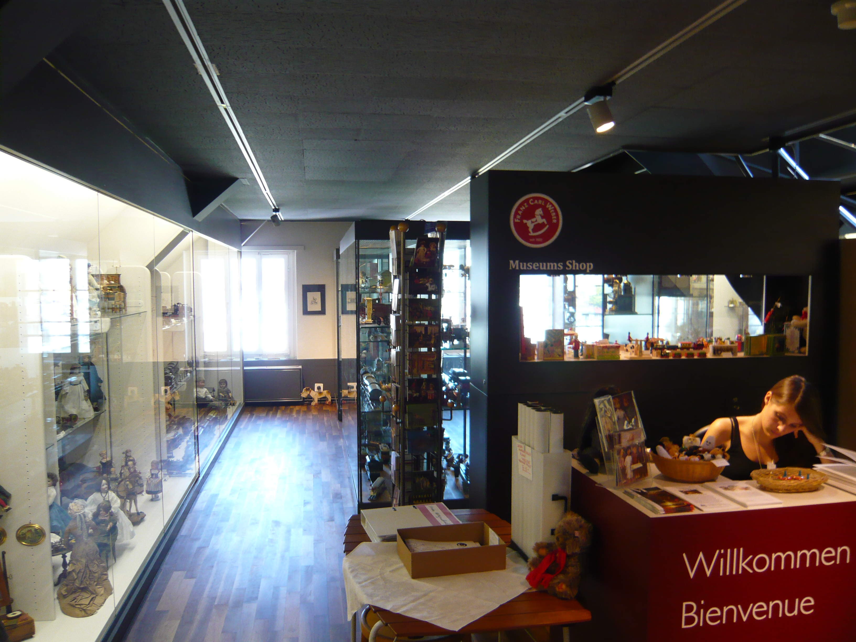 aufgenommen im Zürcher SpielzeugmuseumNative nameZürcher SpielzeugmuseumLocationZürich, SwitzerlandCoordinates47° 22′ 23.15″ N, 8° 32′ 23.22″ EEstablished1956WebsiteZürcher Spielzeugmuseum